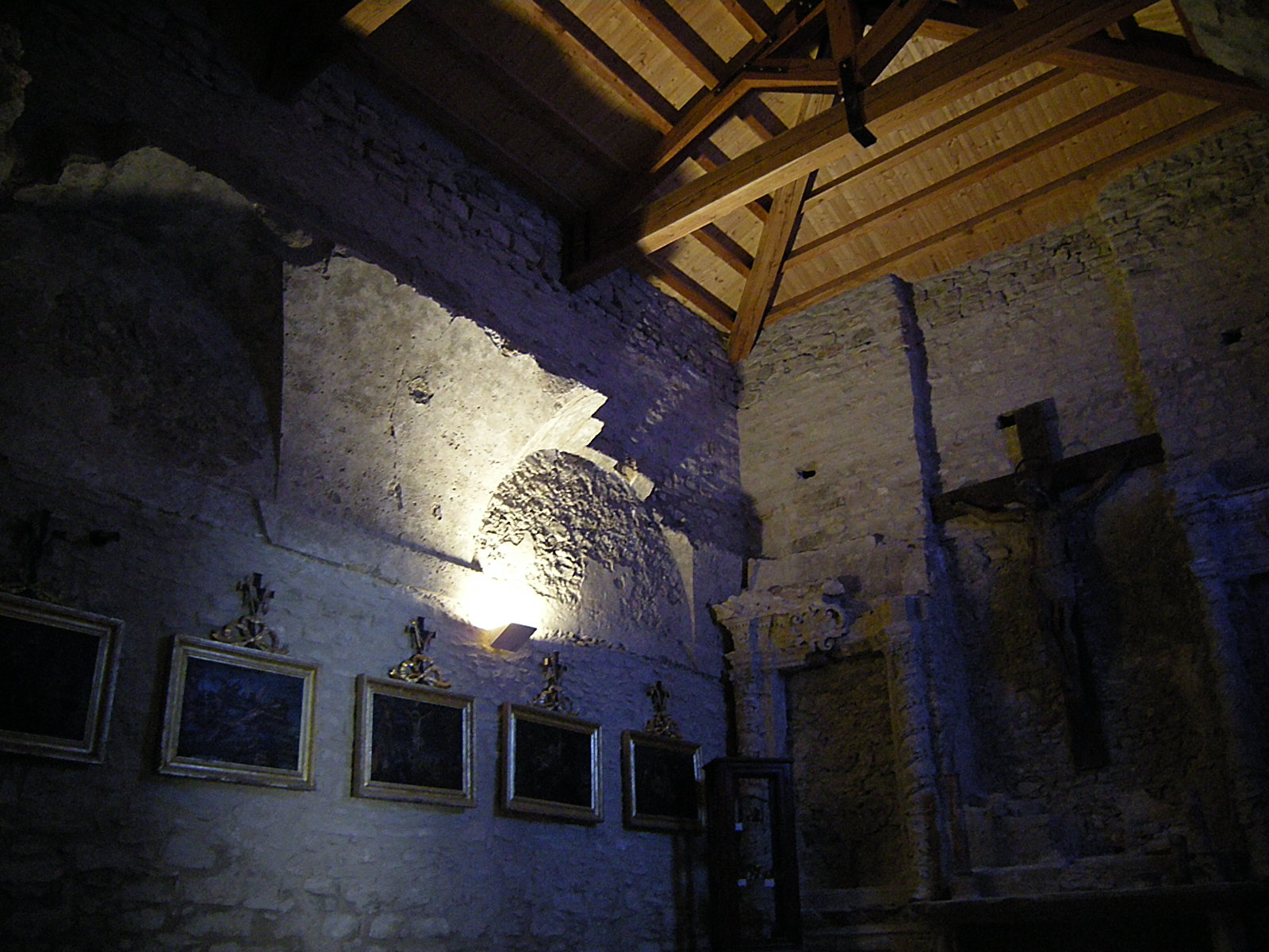 Erice